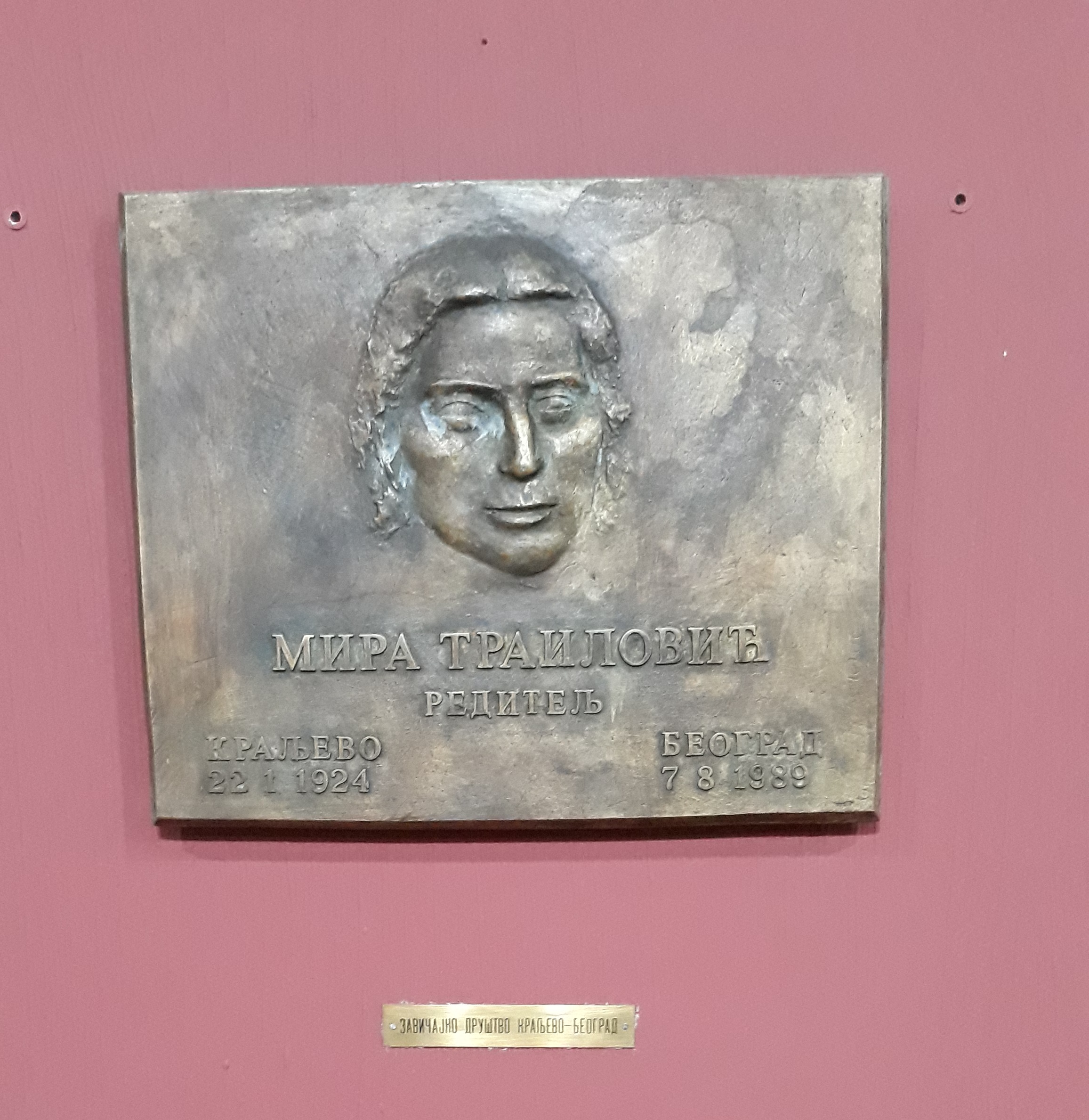 Спомен-плоча Мири Траиловић у фоајеу Краљевачког позоришта